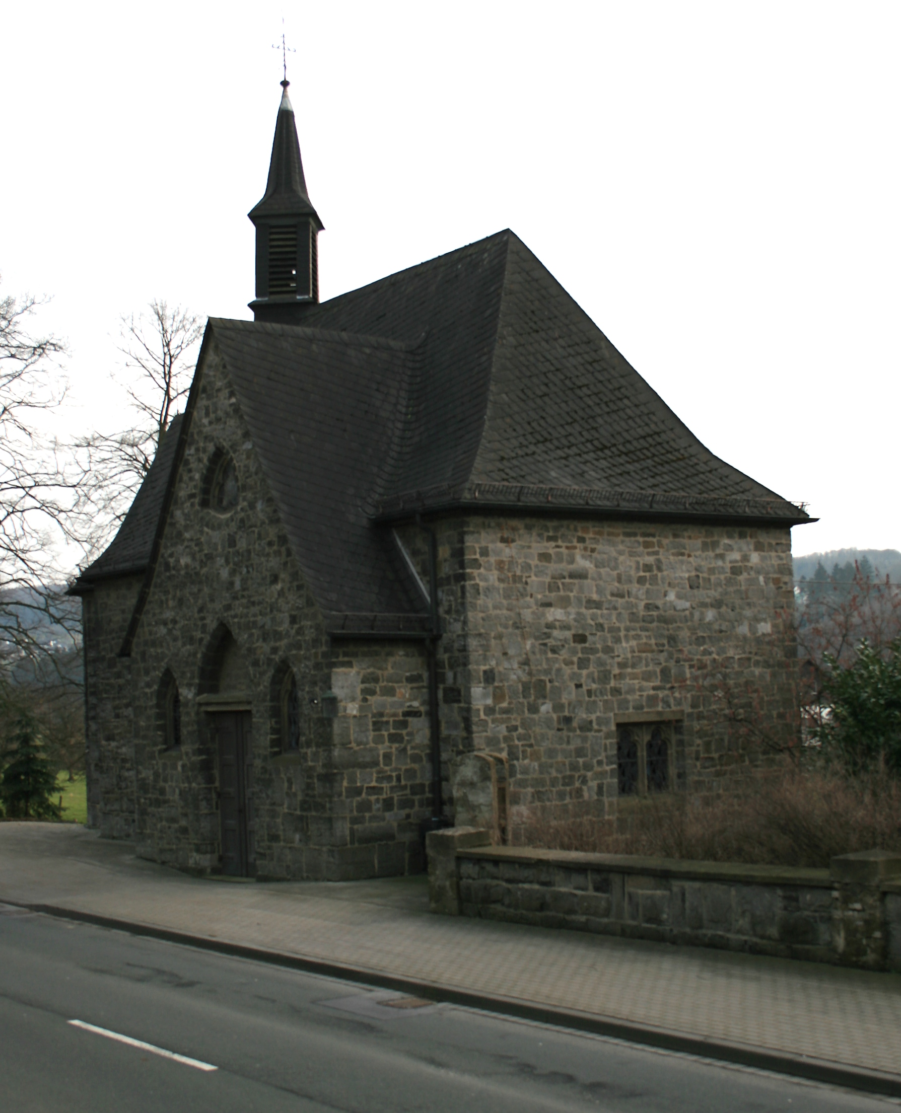 Kapelle „St. Joseph“ im Stadtteil Uentrop der Stadt Arnsberg.